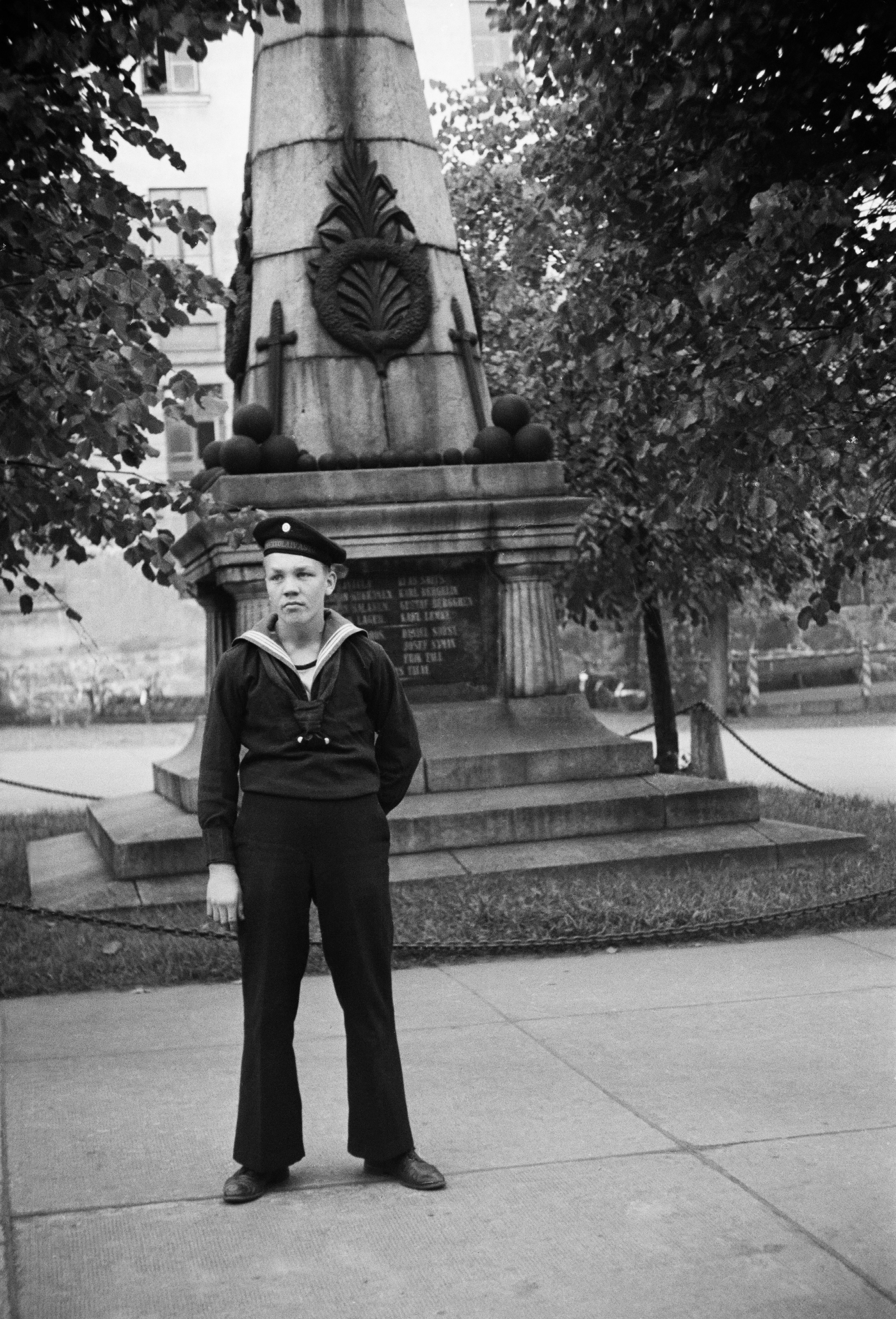 Merisotilas, joka seisoo Gornyi Dubnjakin (Gornij Dubnjakin) taistelun muistomerkin edessä Kaartin kasarmin pihalla (nyk. puolustusministeriön päärakennus); negatiivi, nitraatti, mv